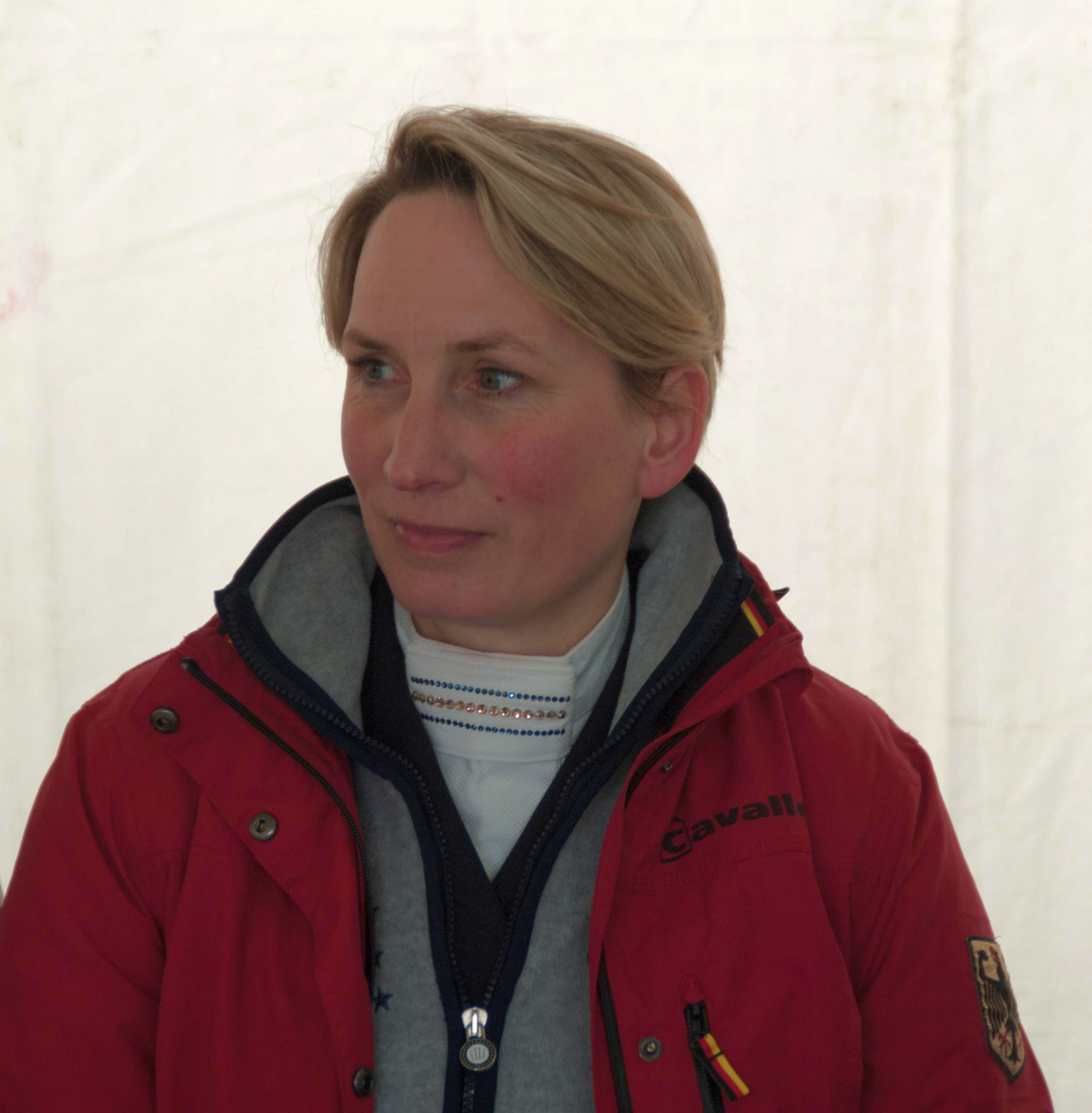 Horses & Dreams 2013: Anabel Balkenhol bei einer Pressekonferenz